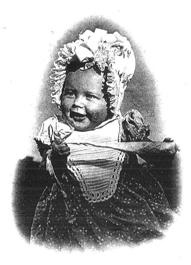 Max Allihn: "Kinderbild." Augenblicksaufnahme von M. Allihn in Athenstedt (1891)